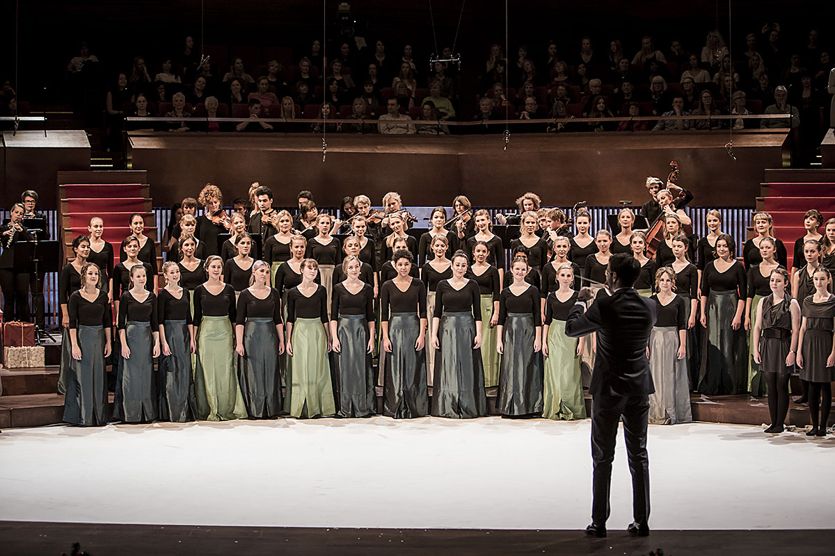 DR PigeKoret ved julekoncerten 2014